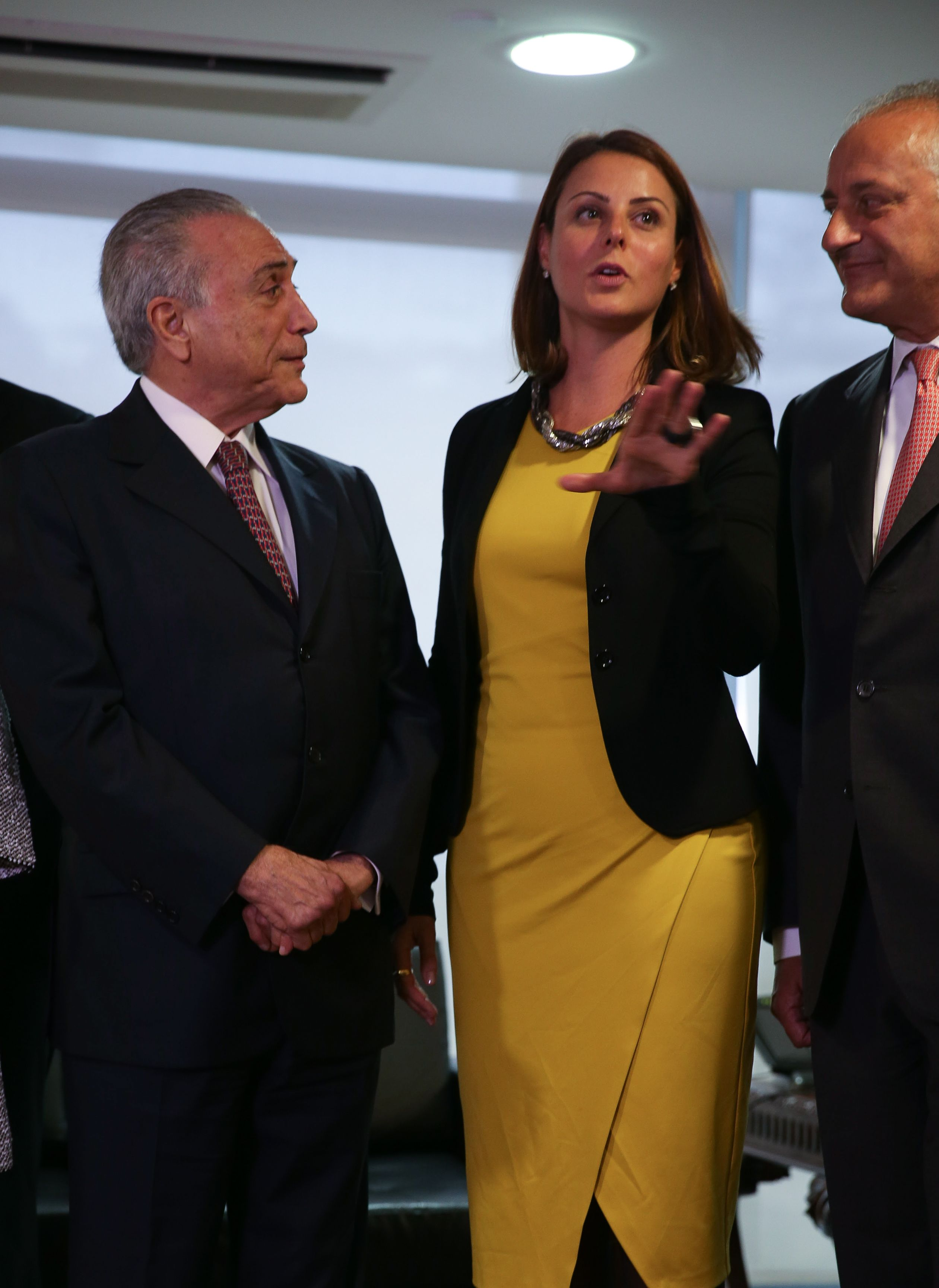 Brasília - O presidente interino, Michel Temer, recebe a deputada do Parlamento italiano, Renata Bueno, e a delegação italiana que a acompanha